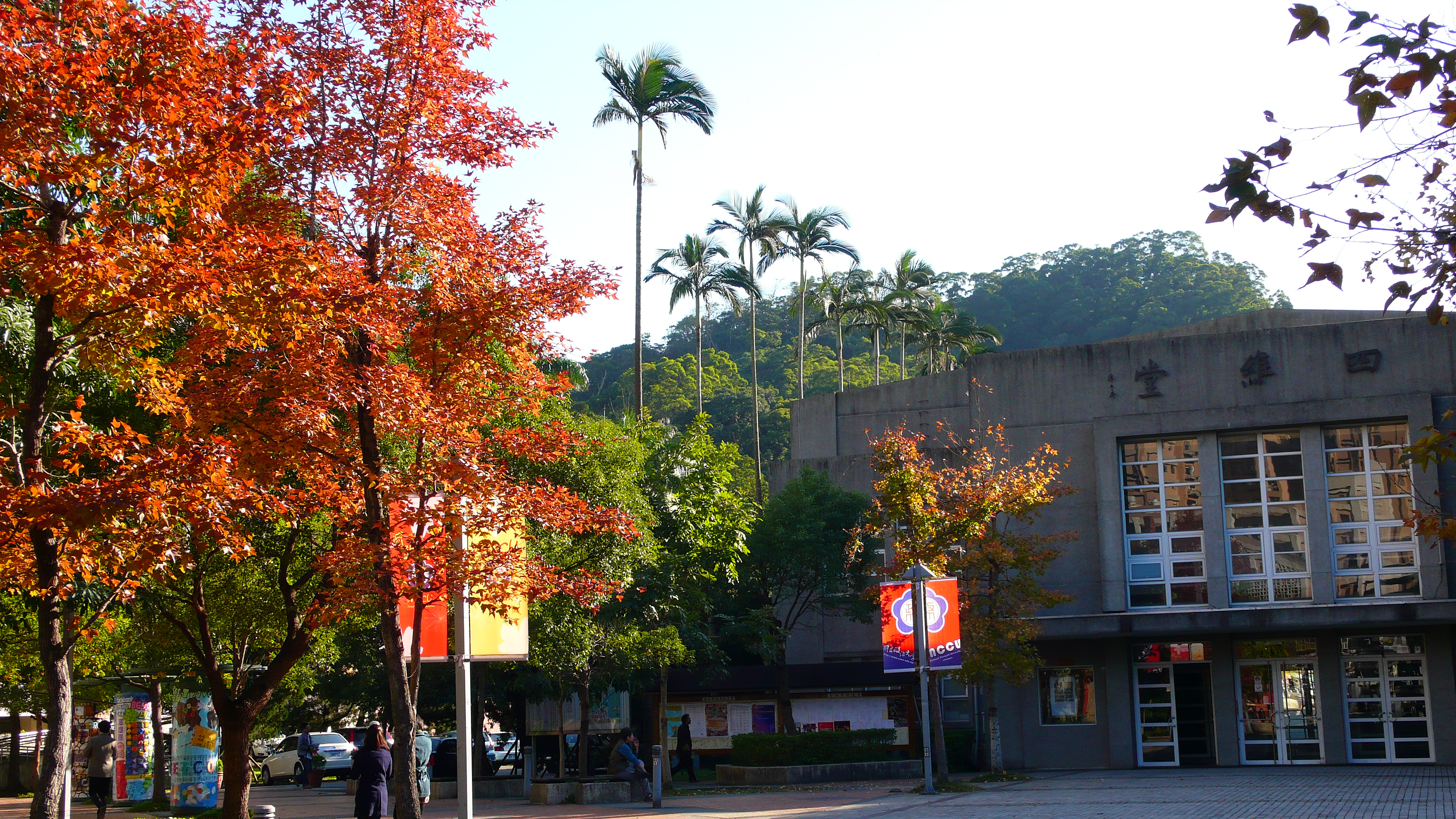 中文（台灣）: 秋色中之政治大學四維堂